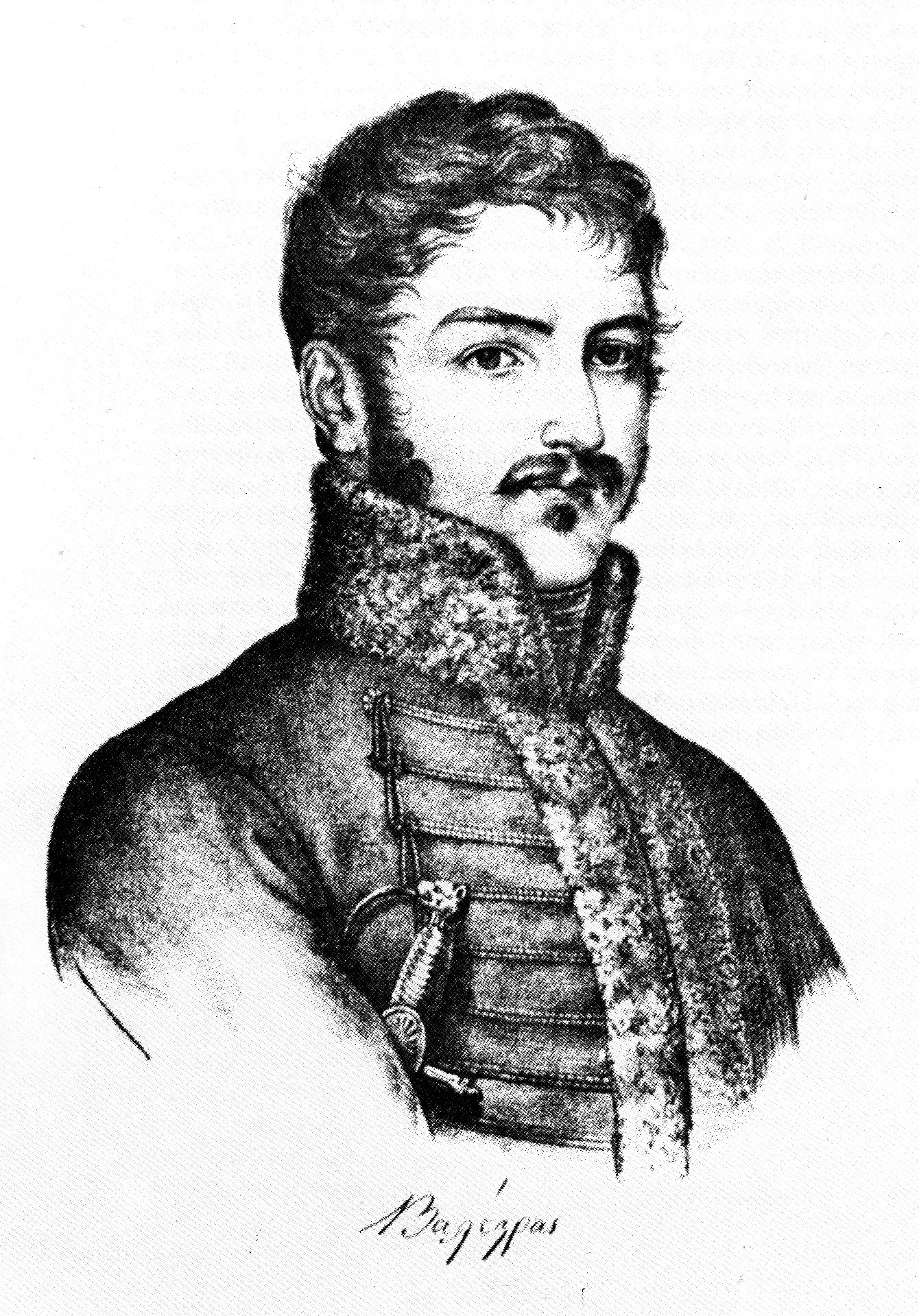 Ο Ιωσήφ Βαλέστ η Βαλέστρας (Joseph Balestra, - 1822) ήταν Γάλλος φιλέλληνας αξιωματικός, κορσικανικής καταγωγής ,πού γεννήθηκε στην Κρήτη.